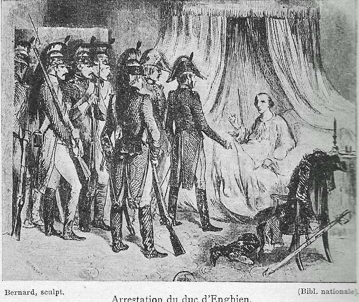 Arrestation du duc en sa maison d' Ettenheim. Gravure du XIXe siècle.